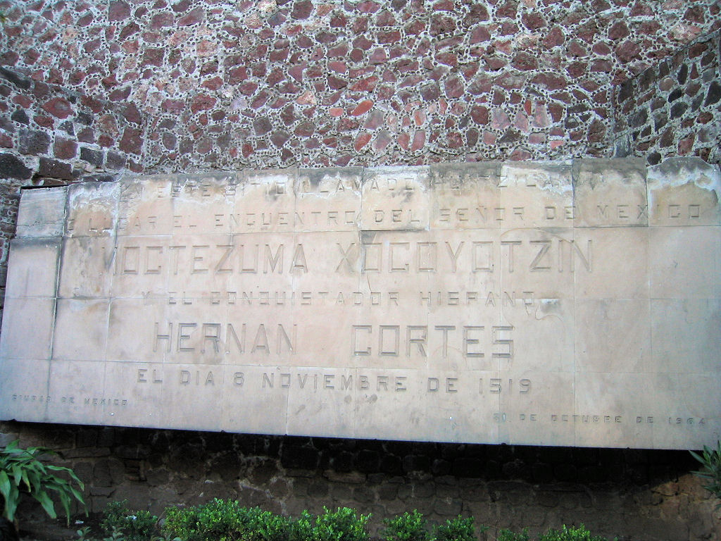 Monument commémorant la rencontre entre Hernan Cortés et Moctezuma.